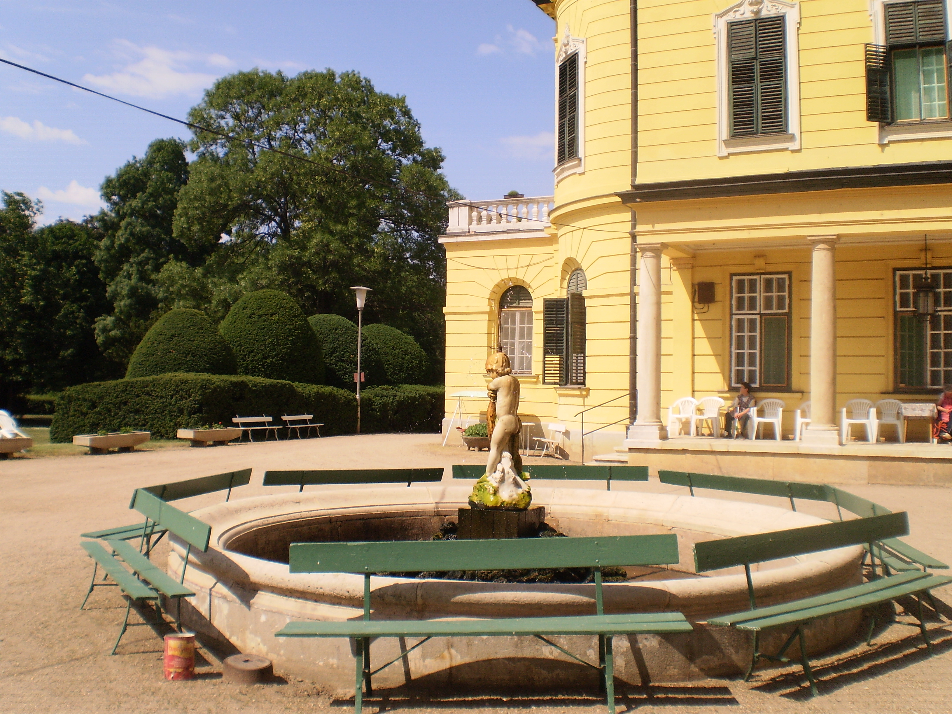 A nagymágocsi Károlyi-kastély a "Kisfiú hallal" szökőkút